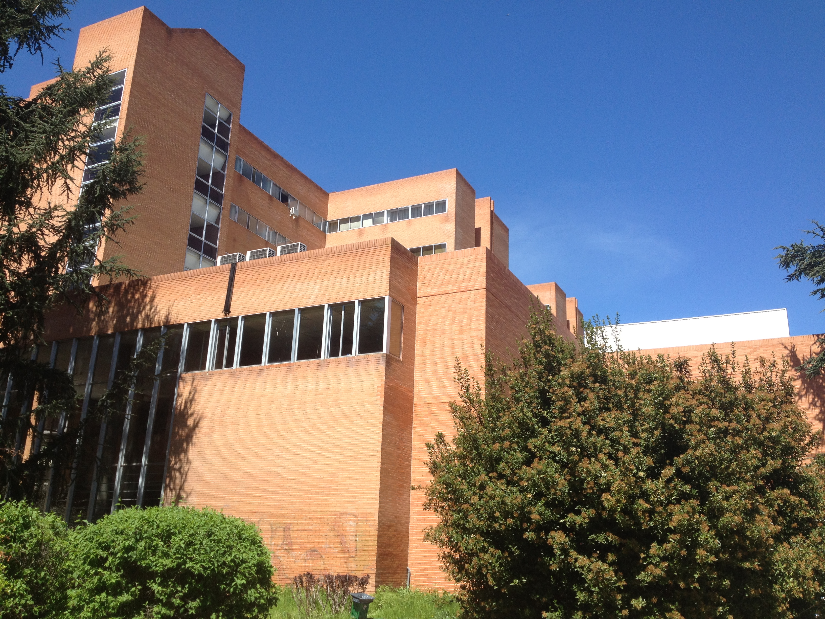 Ampliación del edificio de la Facultad de Derecho de la Universidad Complutense de Madrid